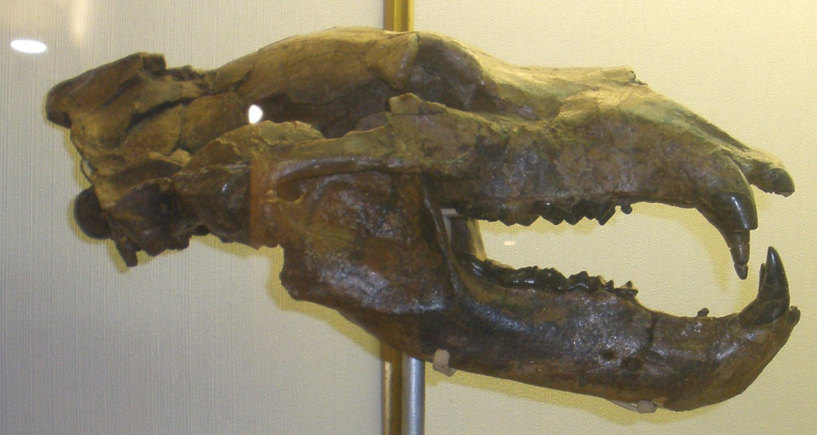 Fossil of Ursus, an extinct mammal -- Topok the picture at Museo di Paleontologia di Firenze